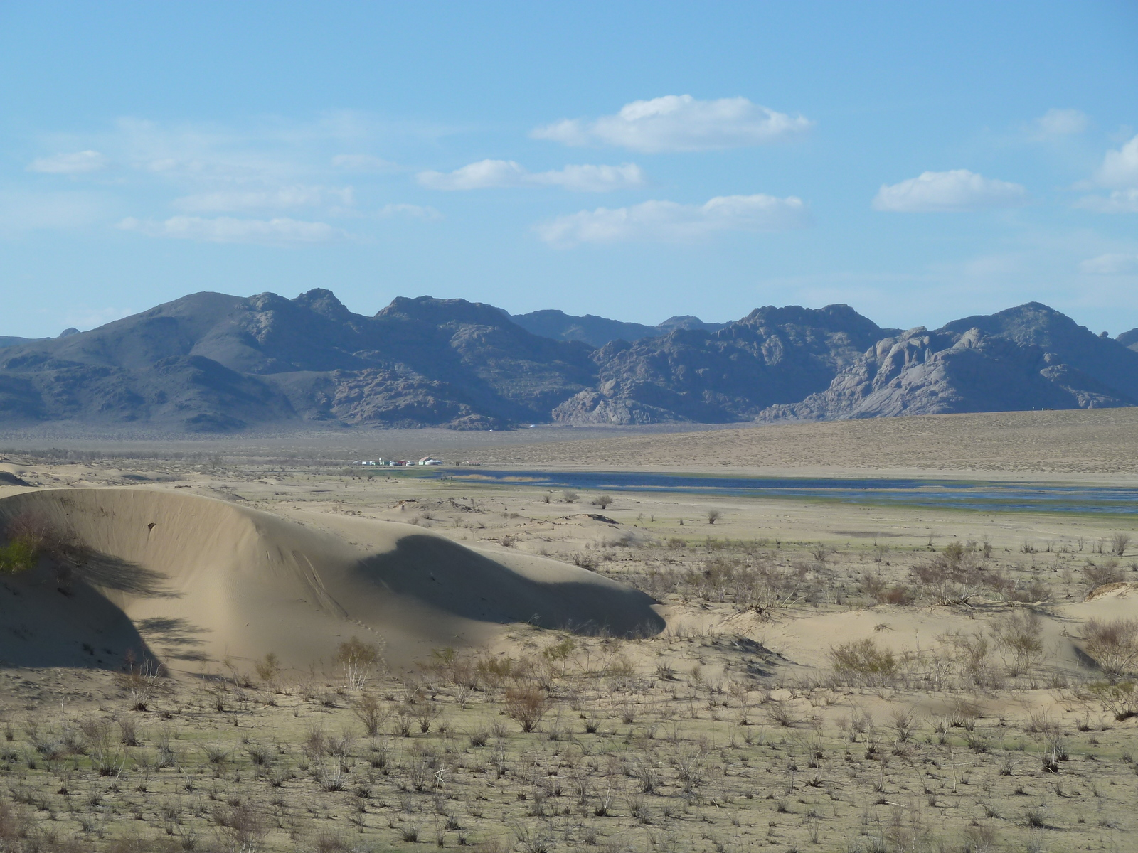 Rashaant, Mongolia